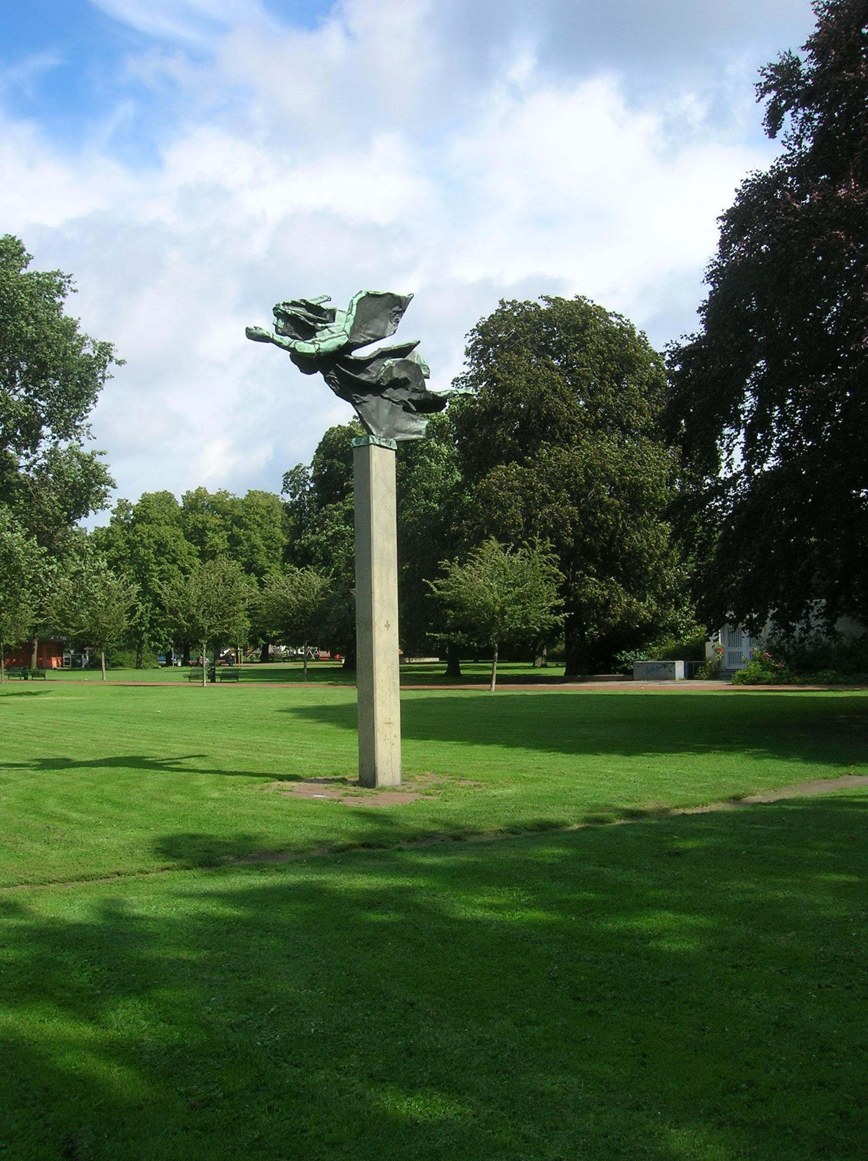 Plastik „Windsbraut“ von Gerhard Olbrich auf dem Martin-Donandt-Platz in Bremerhaven